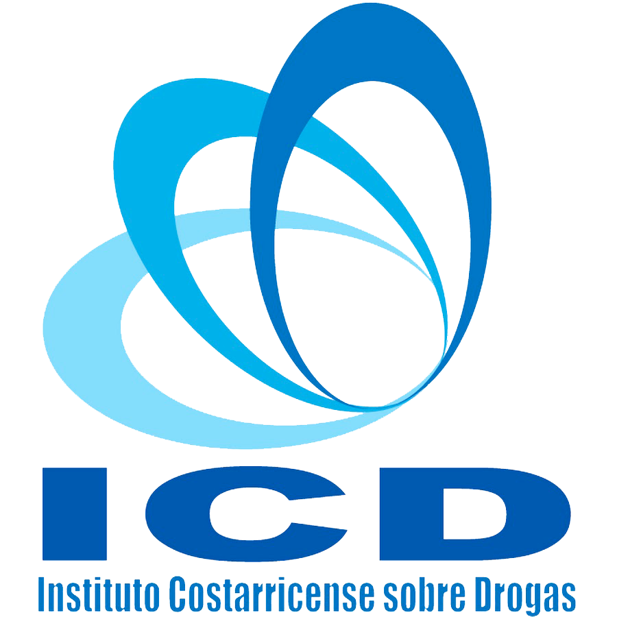 Logo del Instituto Costarricense Sobre Drogas (ICD).